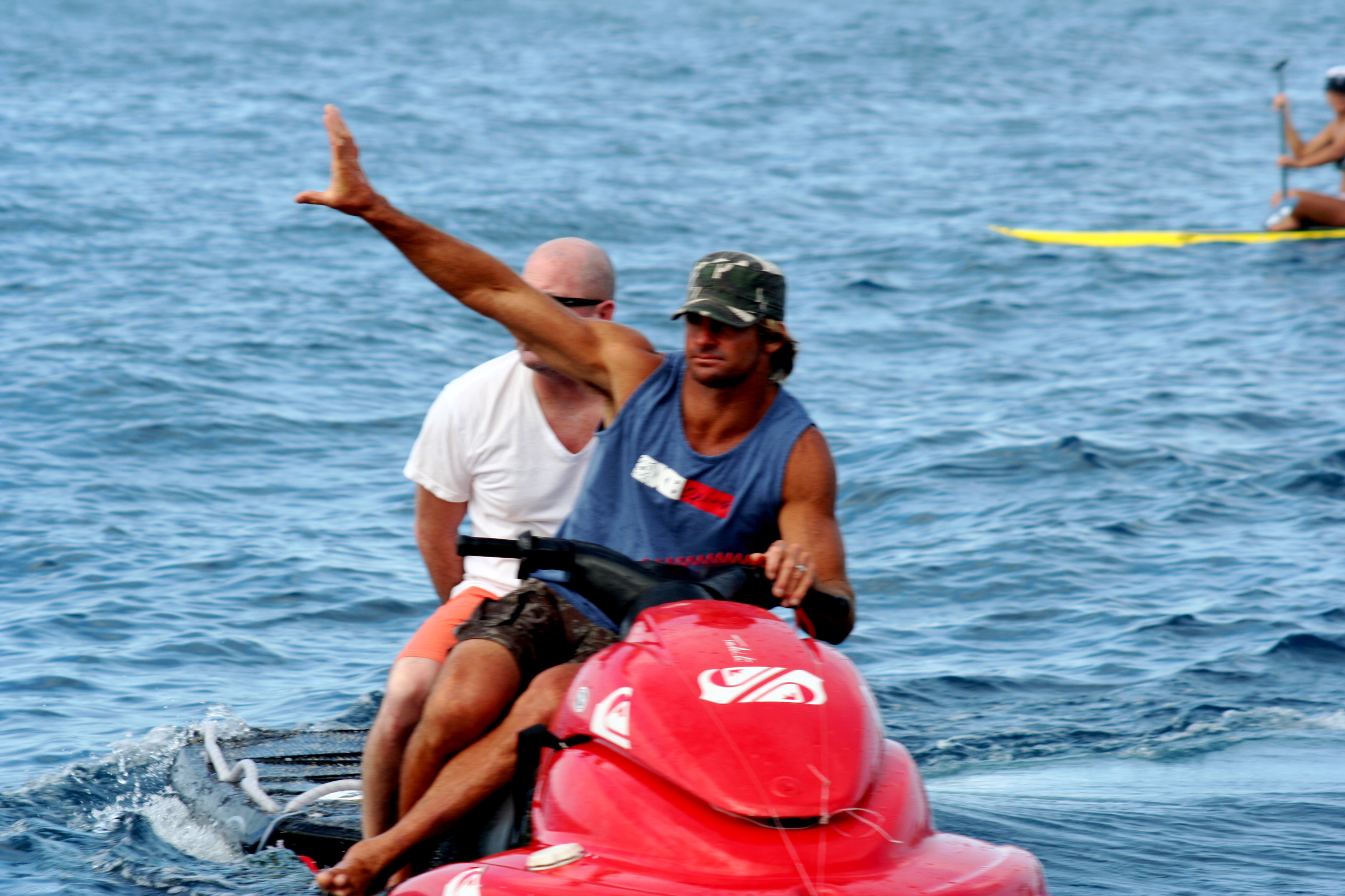 Laird Hamilton, Teahupoo, Papeete, Tahiti